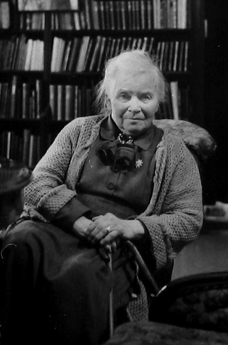 Elisabeth Hjelmqvist (1868-1958)